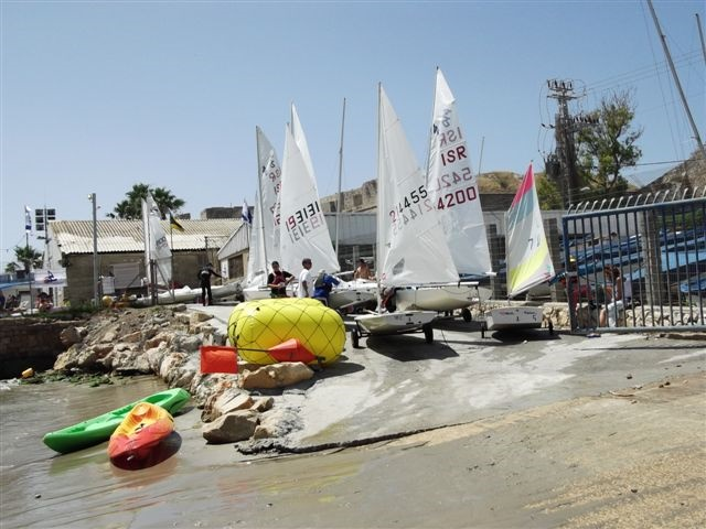 מגלש העלאת סירות של עמותת שיט עכו לכיוון חוף בית הספר קציני ים יוני 2013